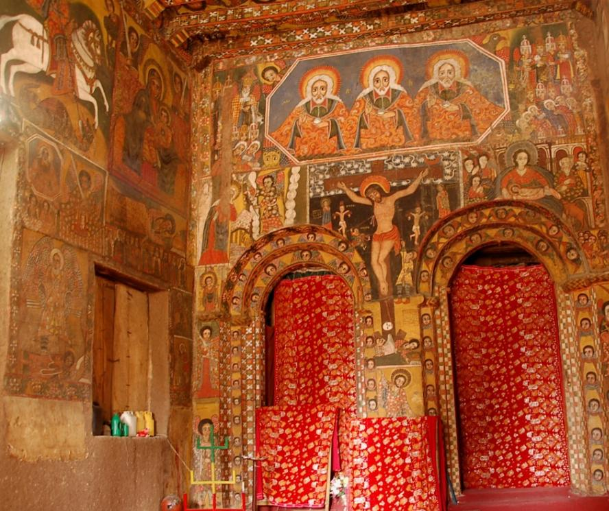 Intérieur de l'église Debré Berhan Sélassié